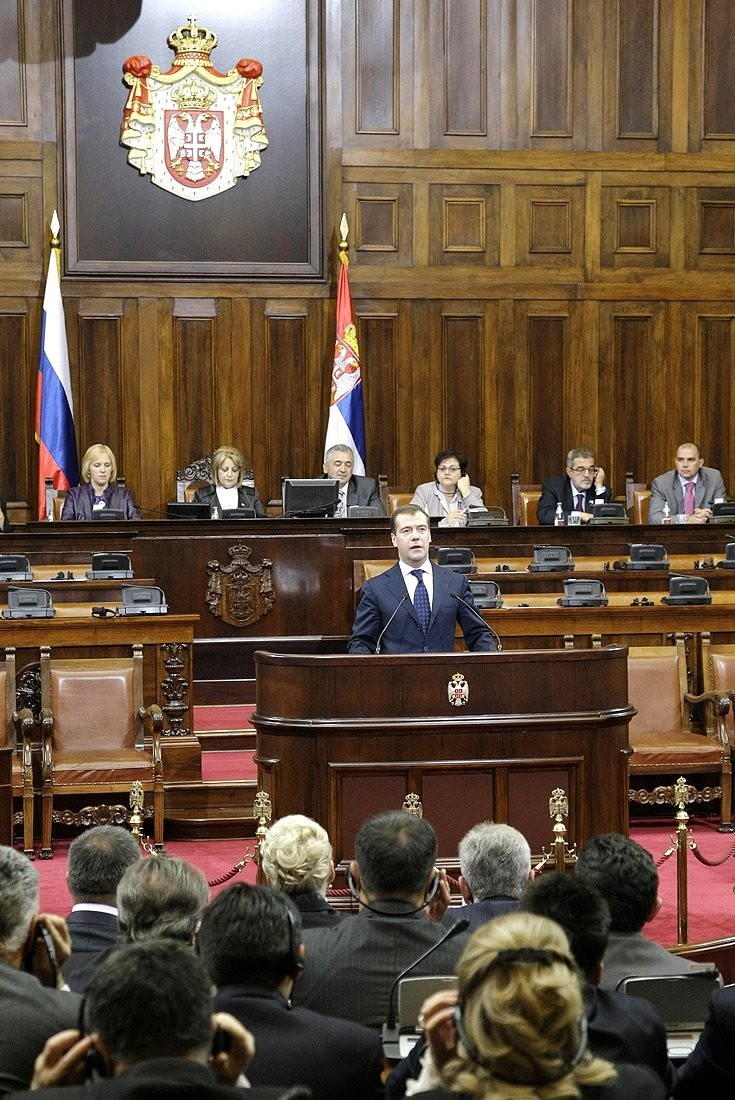 Выступление в Народной скупщине Сербии.